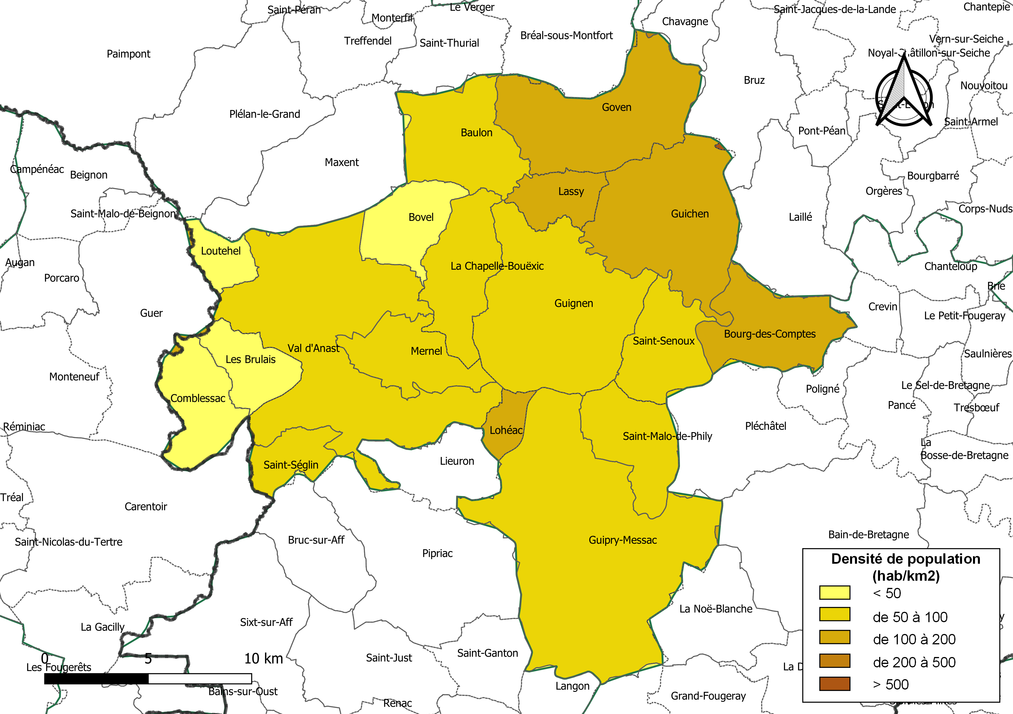 Carte des densités de population (millésimée 2016) des communes de l'intercommunalité Vallons de Haute-Bretagne Communauté, département d'Ille-et-Vilaine, France. Composition au 1er janvier 2019.